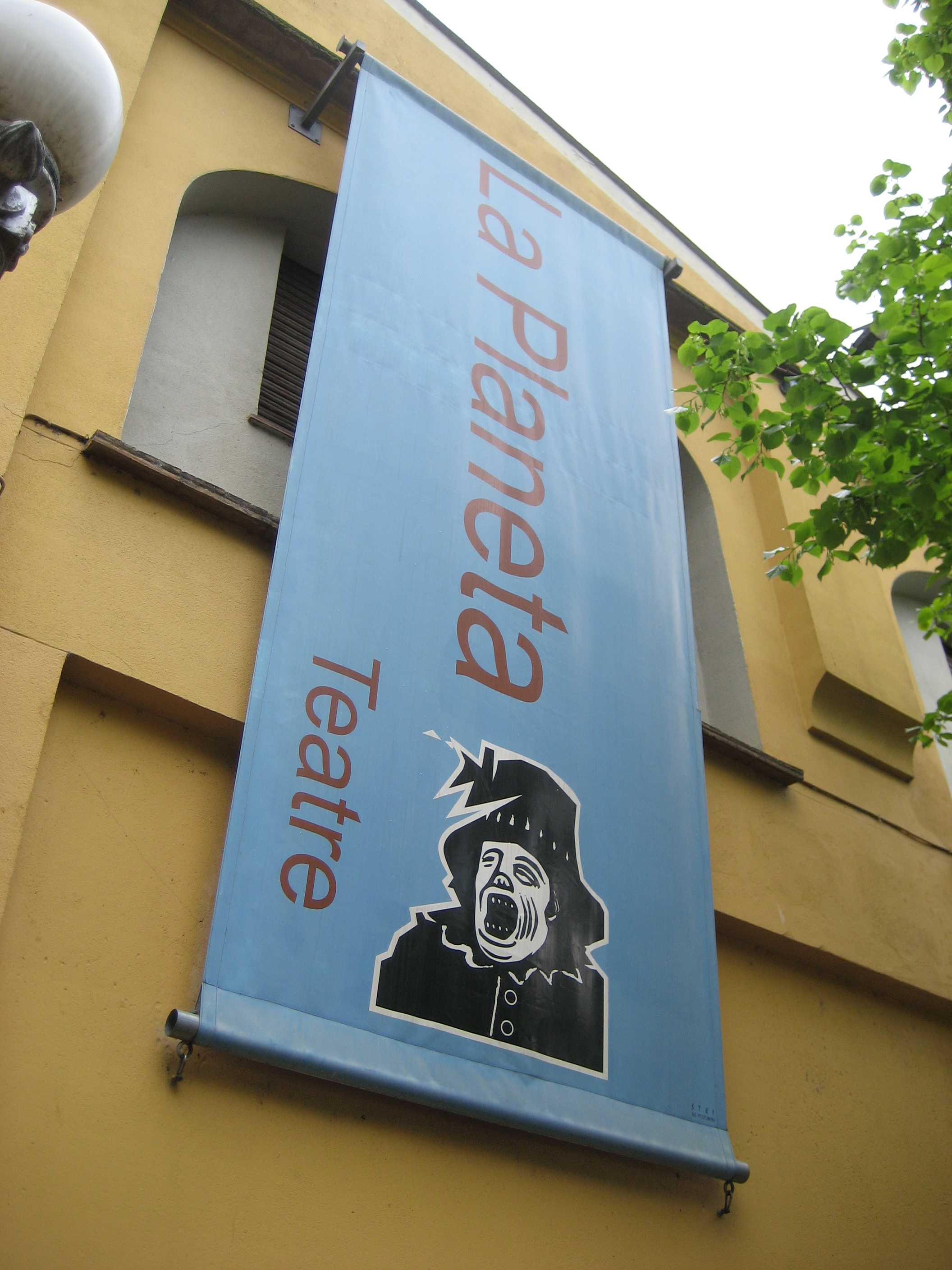 Sala La Planeta, Girona.